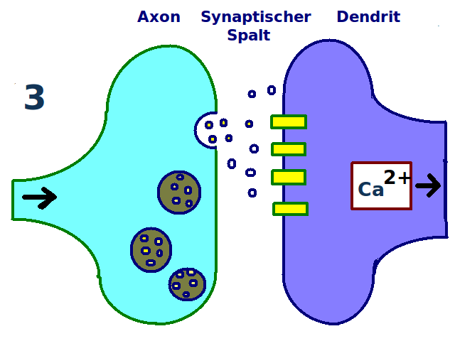 Langzeit-Potenzierung Dritte Stufe